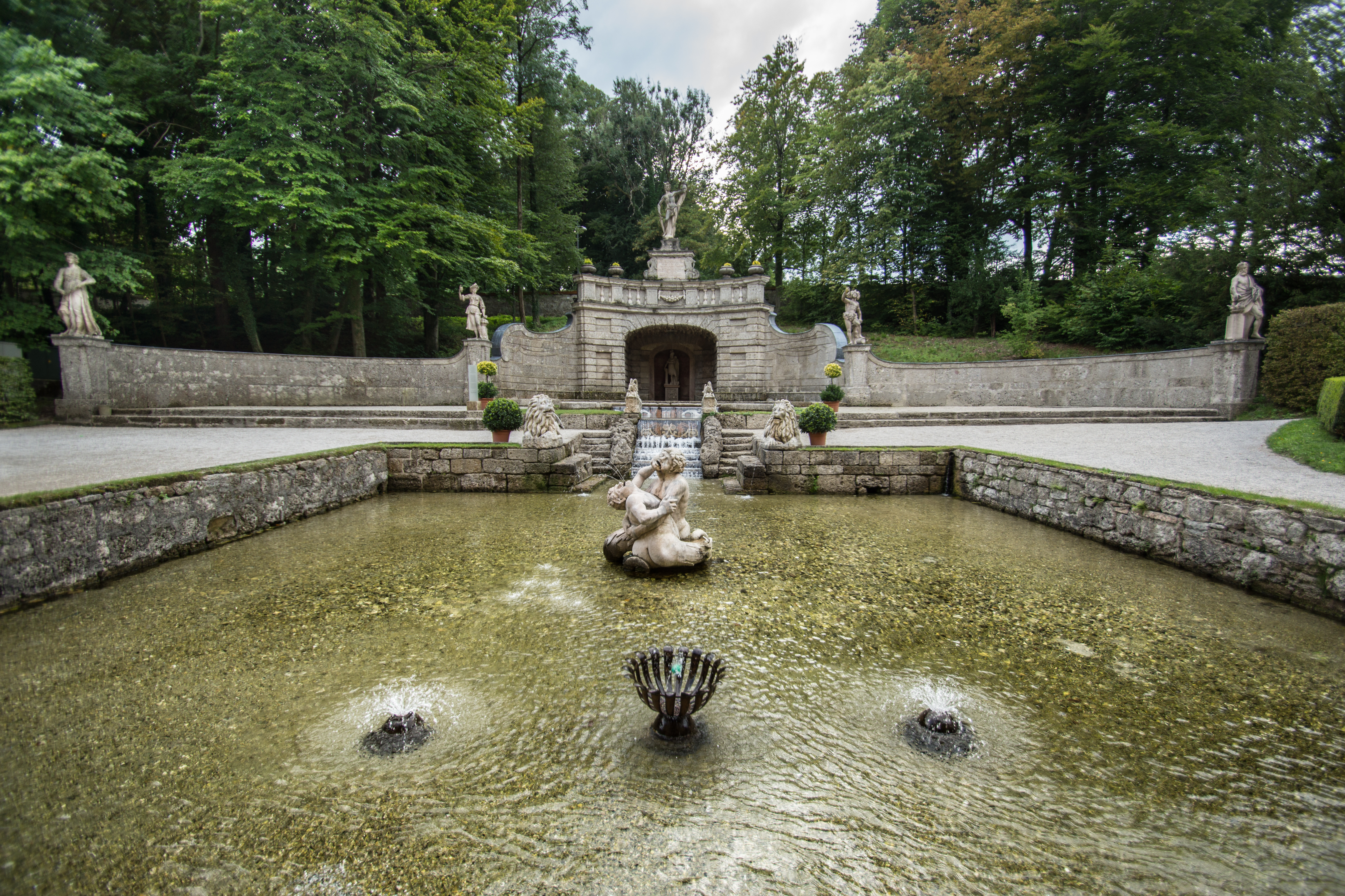 Schlossanlage Hellbrunn, Gesamtanlage samt Gartenbaudenkmalen